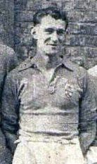 André Riou (en 1943).